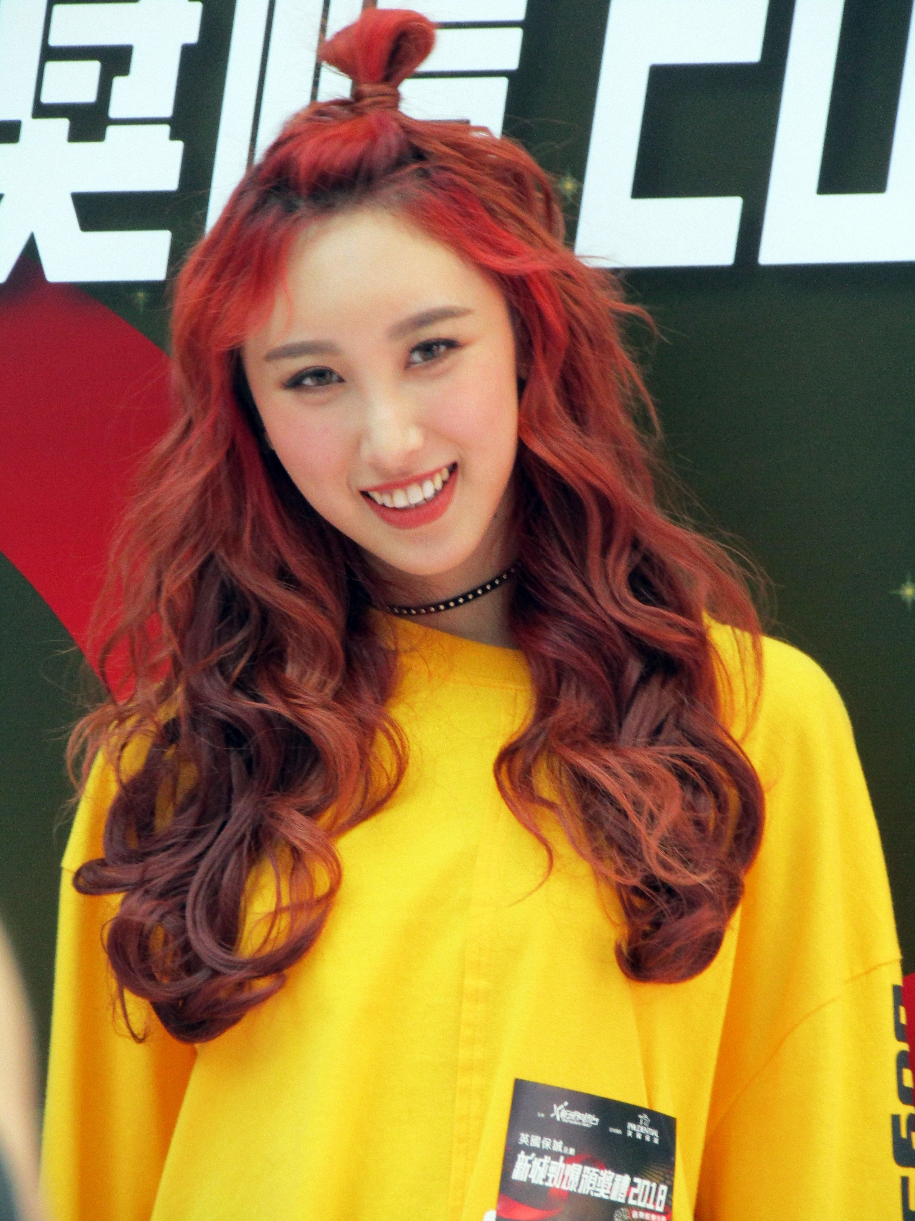 中文（香港）: 許靖韻於新都城中心二期演出